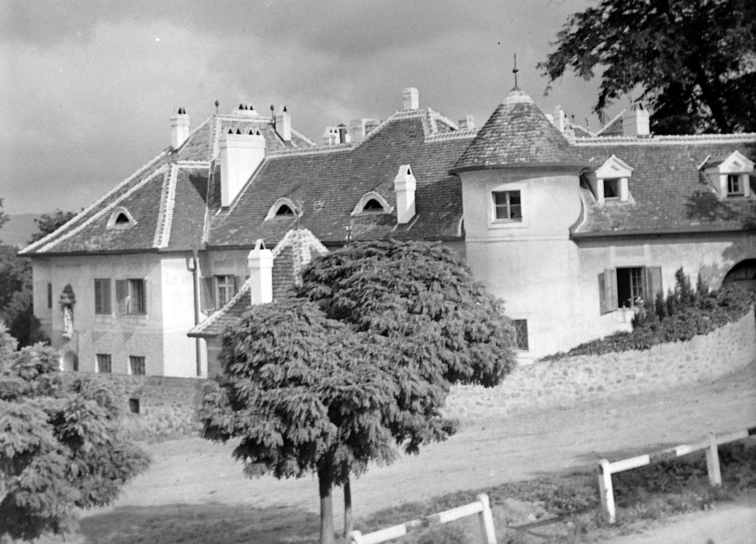 Esterházy kastély. Location: Hungary, Szigliget Tags: chimney Title: Esterházy kastély.